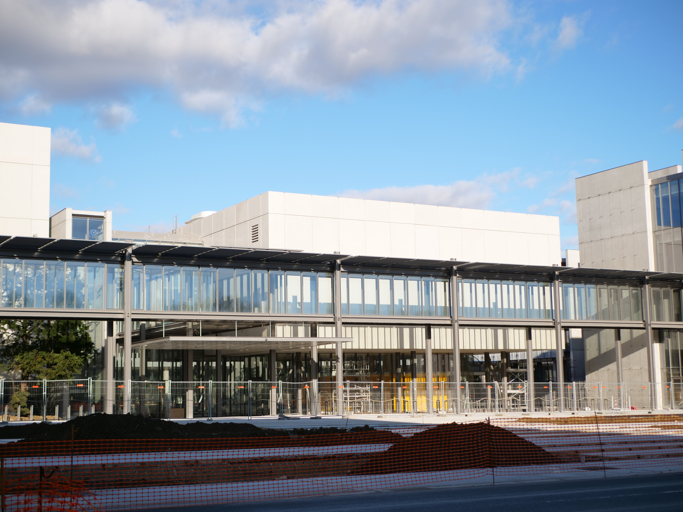 Vue sur l'entrée principale de l'École normale supérieure Paris-Saclay, composante de l'université Paris-Saclay.